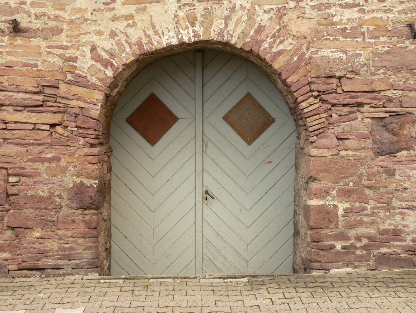 Altes Brennhaus in Fürstenberg, Tor im Untergeschoss